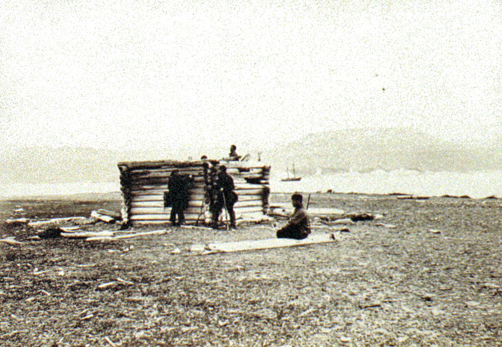 Het Behouden Huys in 1881 tijdens de Nederlandse expeditie naar het gebied tijdens het Eerste Internationale Pooljaar.Template:Coor title dms (Het is de vraag of dit daadwerkelijk het Behouden Huys is. Dat was namelijk 6 m. breed en 10 m. lang en bij de vondst in 1871 al behoorlijk ingestort. Bovendien meldt Zeeberg, J.J. (2007) - p. 87 dat deze expeditie het Behouden Huys niet heeft weten te bereiken. [Zeeberg J.J. (2007) Terugkeer naar Nova Zembla: de laatste en tragische reis van Willem Barents. Walburg Pers])Photograph of a log cabin of unknown date, builder, or location. The caption on the website it was uploaded from states that it is the "Behouden Huys" of William Barents on Novaya Zemlya. However, Elling Carlsen discovered and sketched the ruins of the Behouden Huys 1871 and noted it's dimensions as 12 yards by 7.5 yards. On July 29th, 1876, Charles L.W. Gardiner noted that "Everything that was not pulled down by Captain Carlsen in 1871, has by this time tumbled down ; not a vestige of the old house remains standing" In short, the attribution to Willem Barents is clearly bogus.